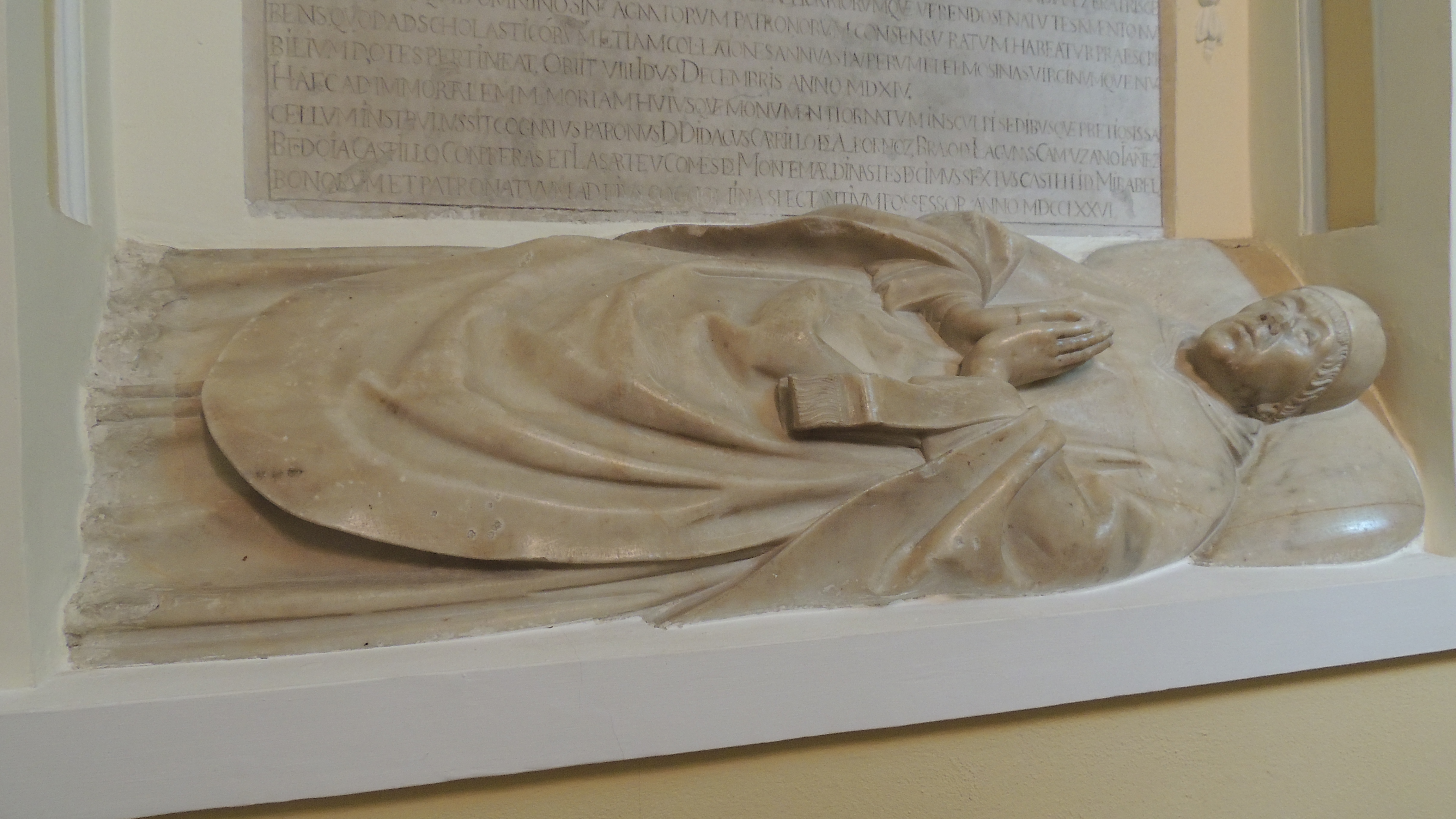 Sepulcro de Alonso Yáñez de Mendoza